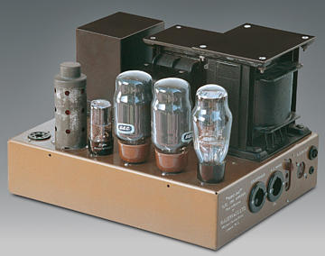 LEAK TL/12 Point One Amplifier